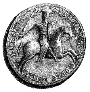 Sceaux de Hugues IV de Bourgogne